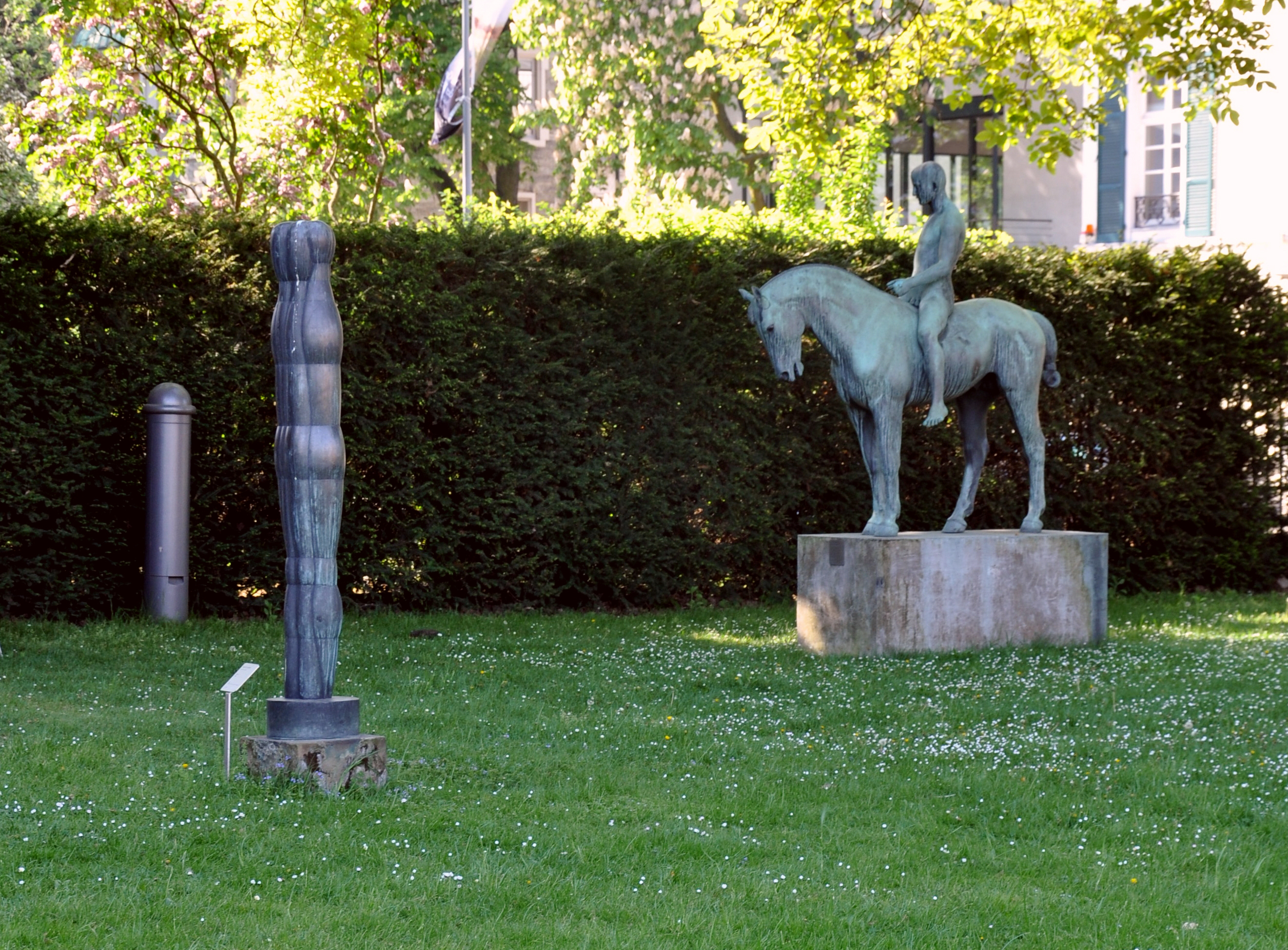 Frankfurt am Main, Skulpturengarten des Städel, Joannis Avramidis: Figur I (links) und Volkmann: Reiter (rechts)